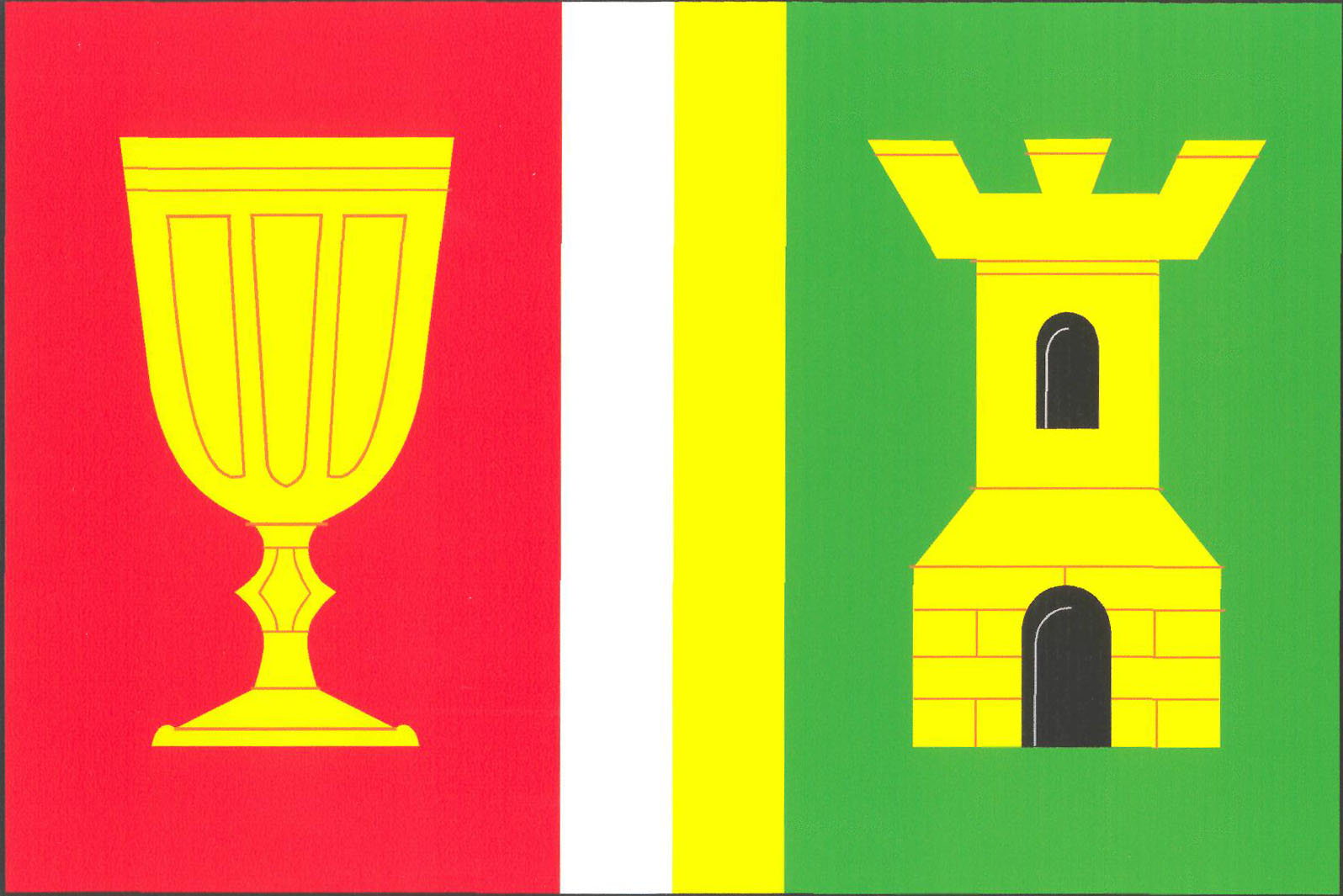 Vlajka obce Bělá (okres Havlíčkův Brod)